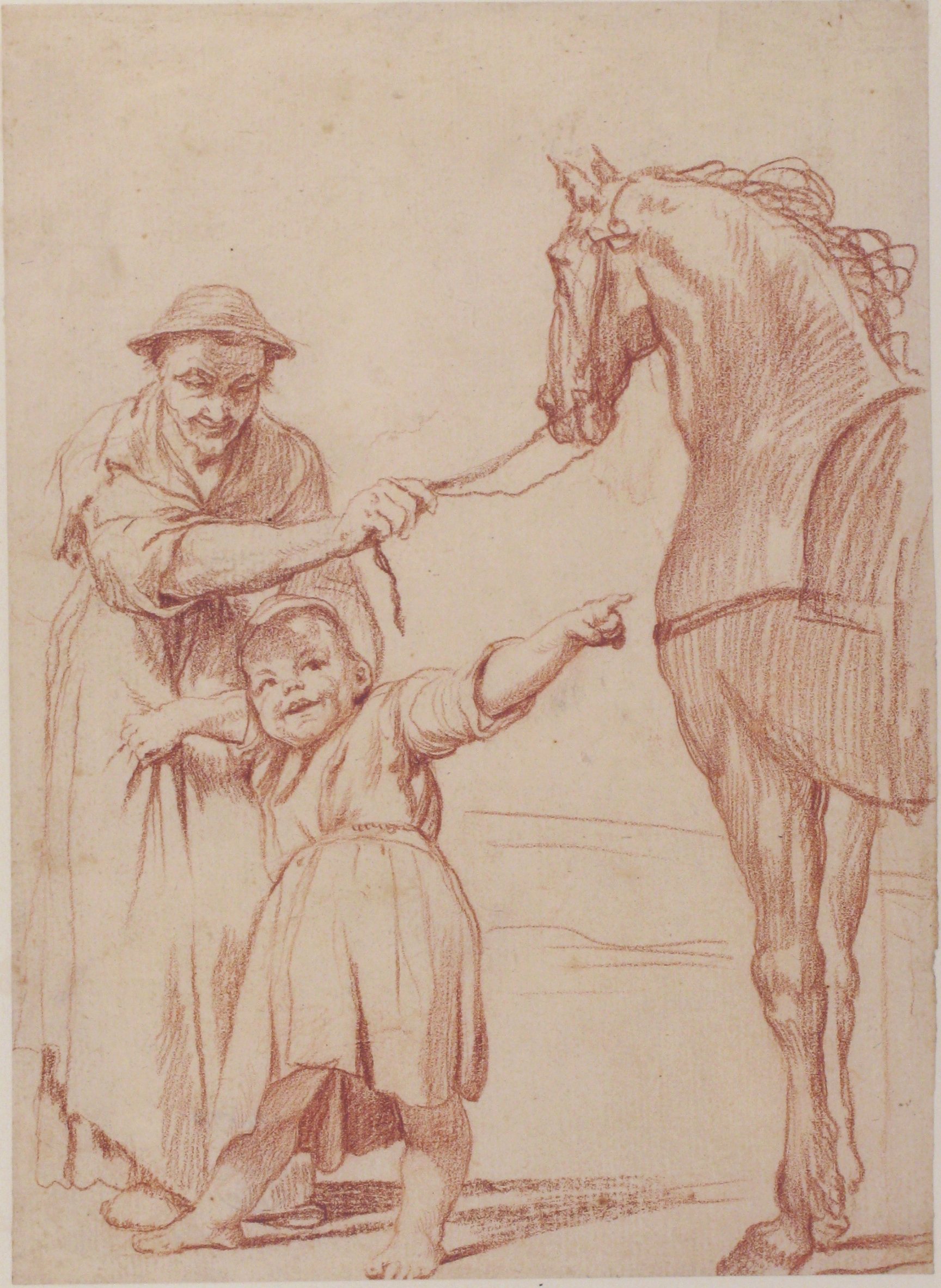 Drawing; Drawings